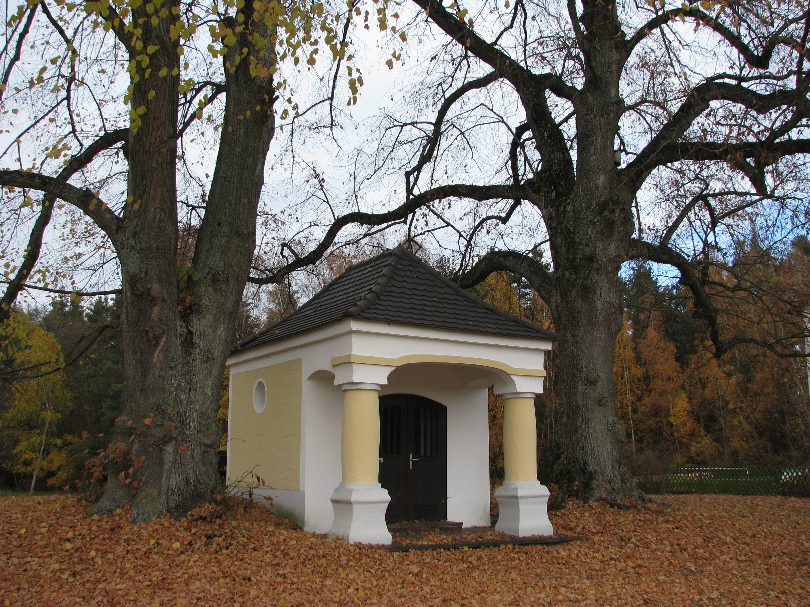 Burggriesbach, Ortsteil von Freystadt im Landkreis Neumarkt in der Oberpfalz in Bayern, Kapelle St. Wendelin